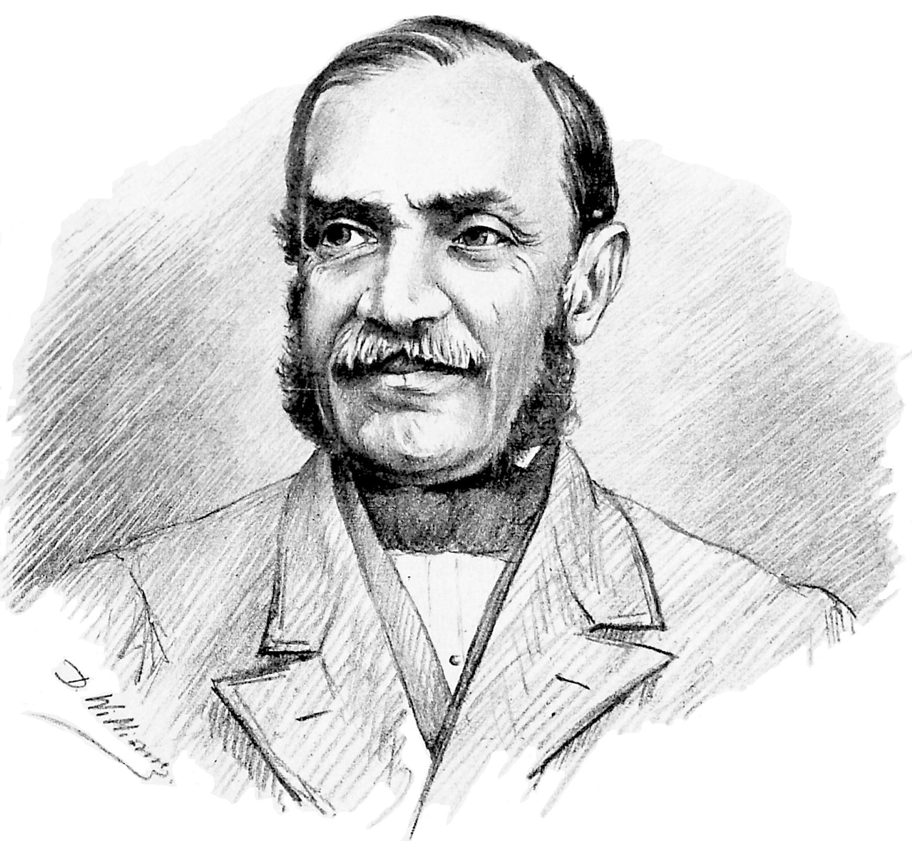 Portraits contemporains avec autographes : Politique, armée, clergé, letters, théatres & arts dessines & lithographies par D. William Bukarest, 1881